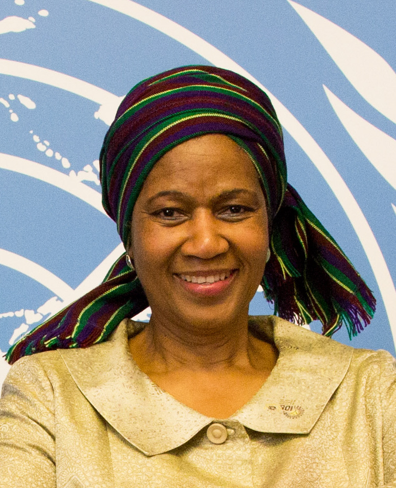 Phumzile Mlambo-Ngcuka (2016), südafrikanische Politikerin und seit 2013 Exekutivdirektorin von UN-Women